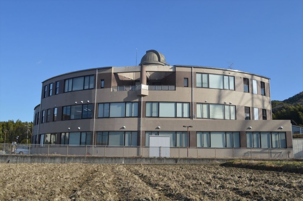 井手町山吹ふれあいセンターにある井手町図書館。